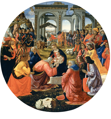 Ghirlandaio, adorazione tornabuoni.jpg